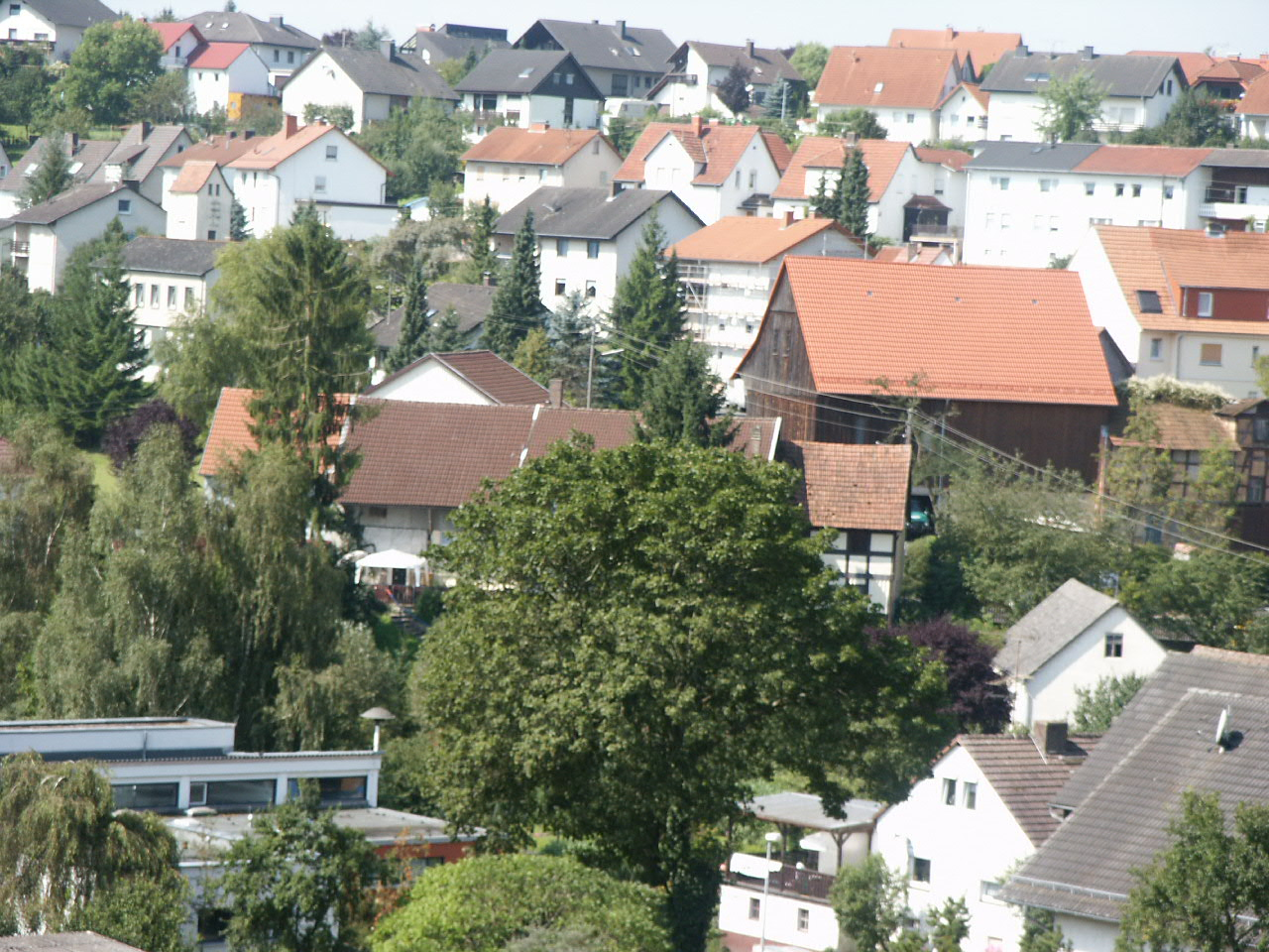 Heenes (Zentrum)